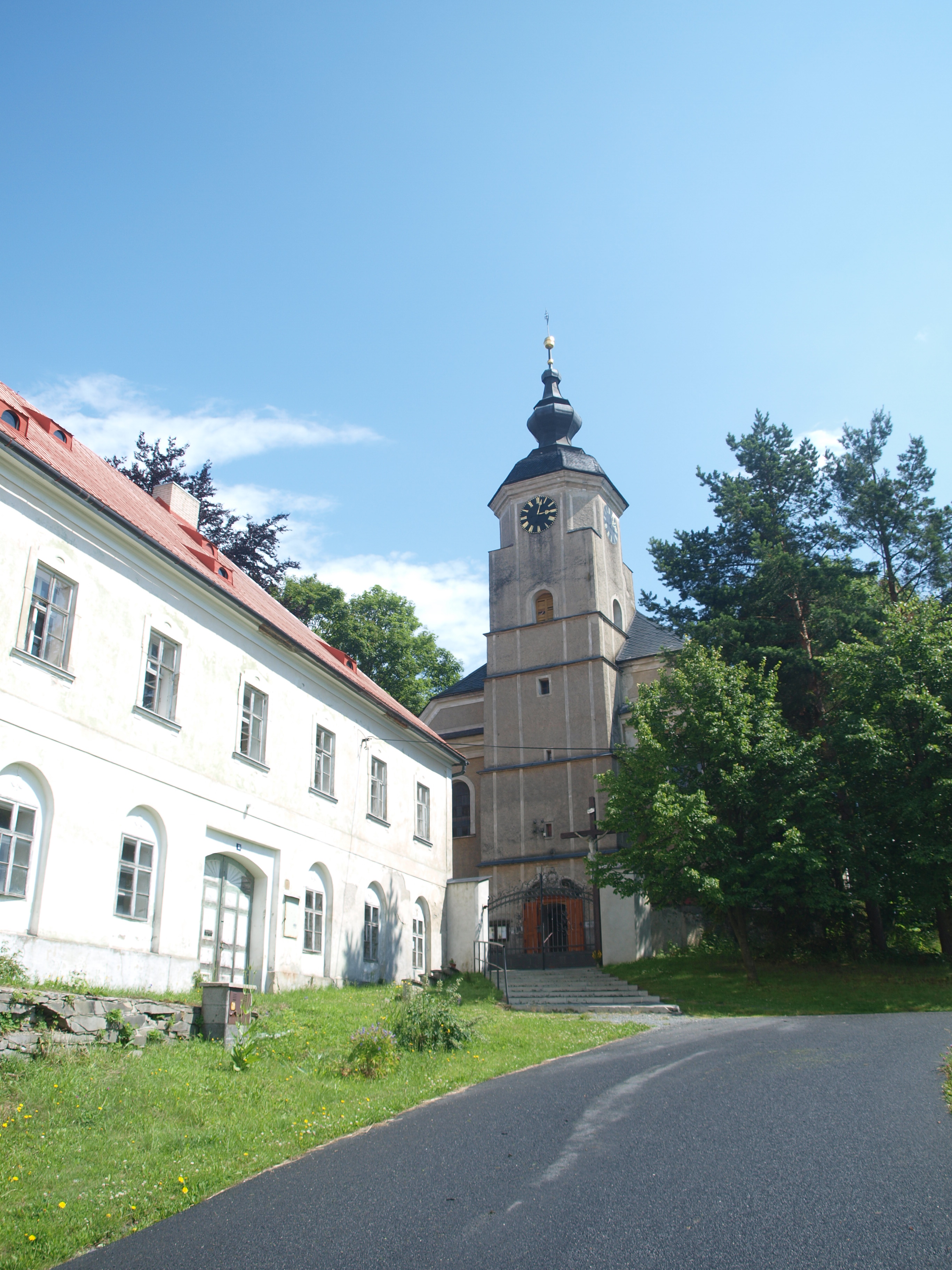 Kostel sv. Jana Křtitele v Ryžovišti